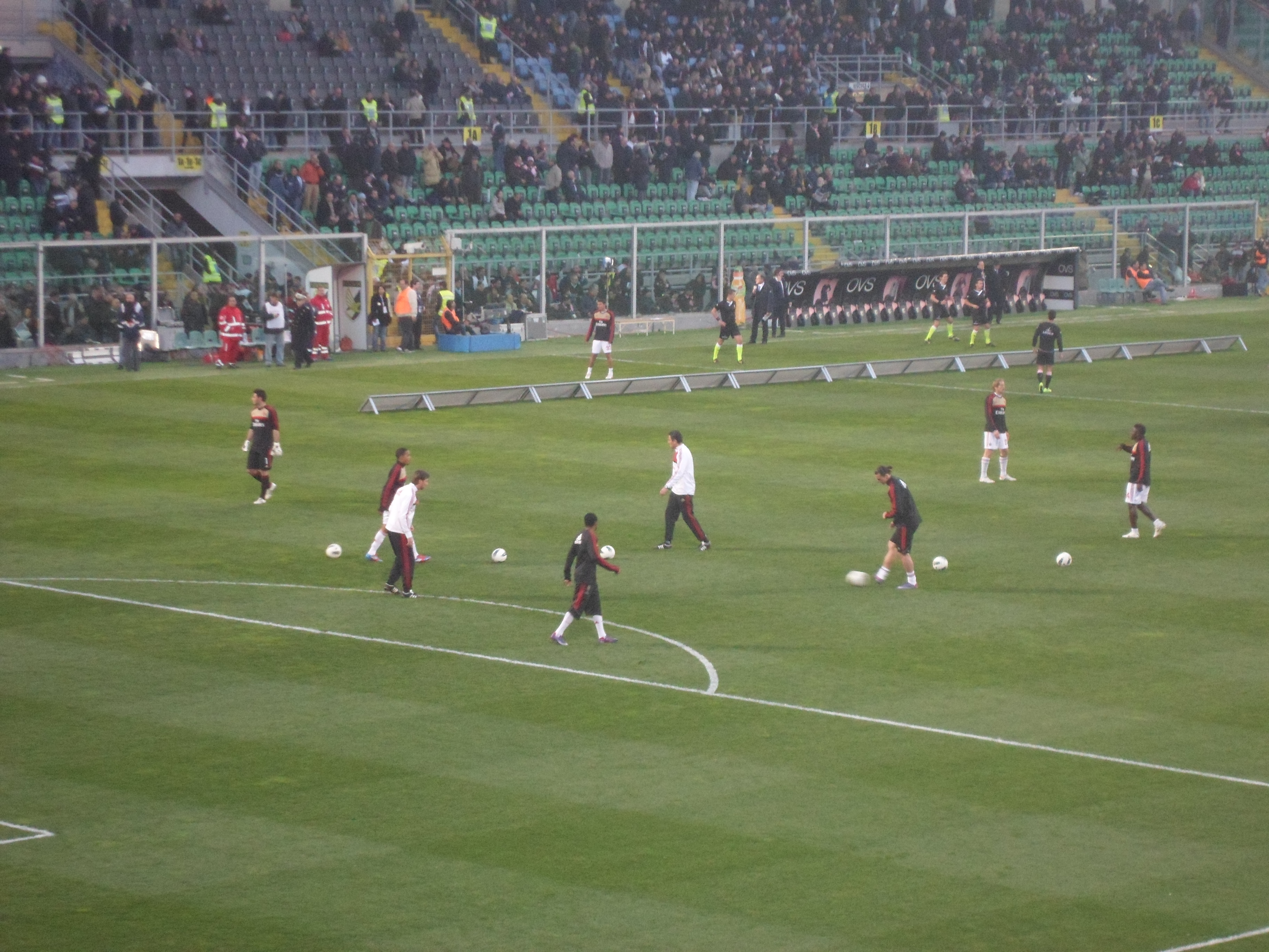 L'AC Milan esegue il riscaldamento prima della partita Palermo-Milan, Serie A 2011-2012